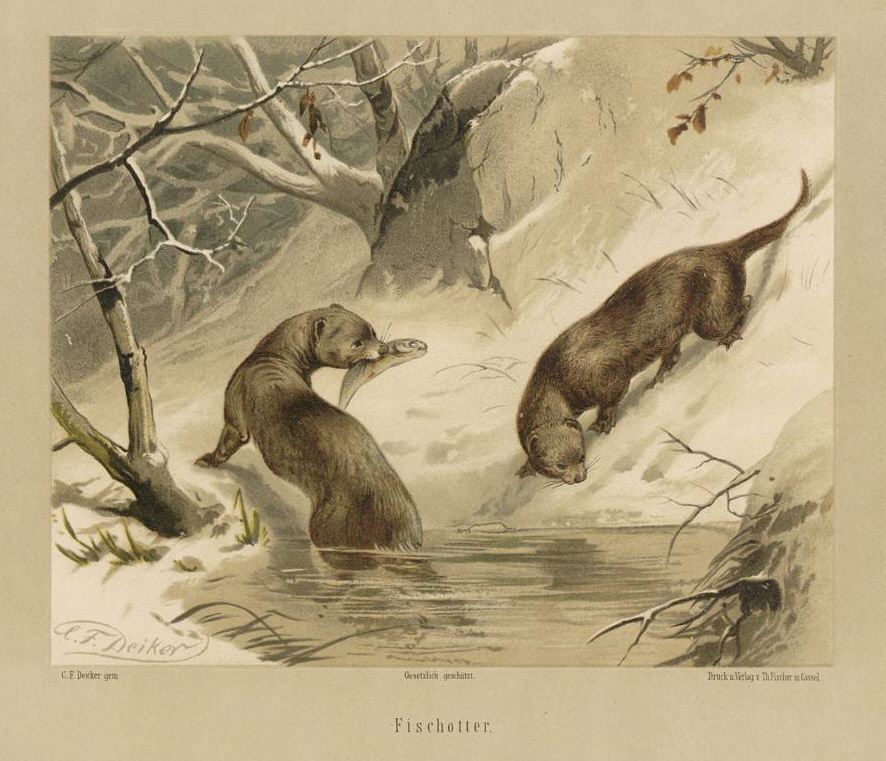 Chromolithographie aus der Serie „Jagdbare Thiere“ von Carl Friedrich Deiker Fischotter